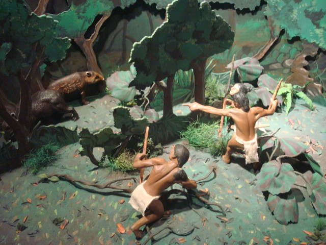 Escena de caza de los indígenas botos, pueblo de Costa Rica que habitó las llanuras de San Carlos y Sarapiquí y las cercanías de los volcanes Poás y Barva, previo a la llegada de los españoles. Parque Nacional Volcán Poás.